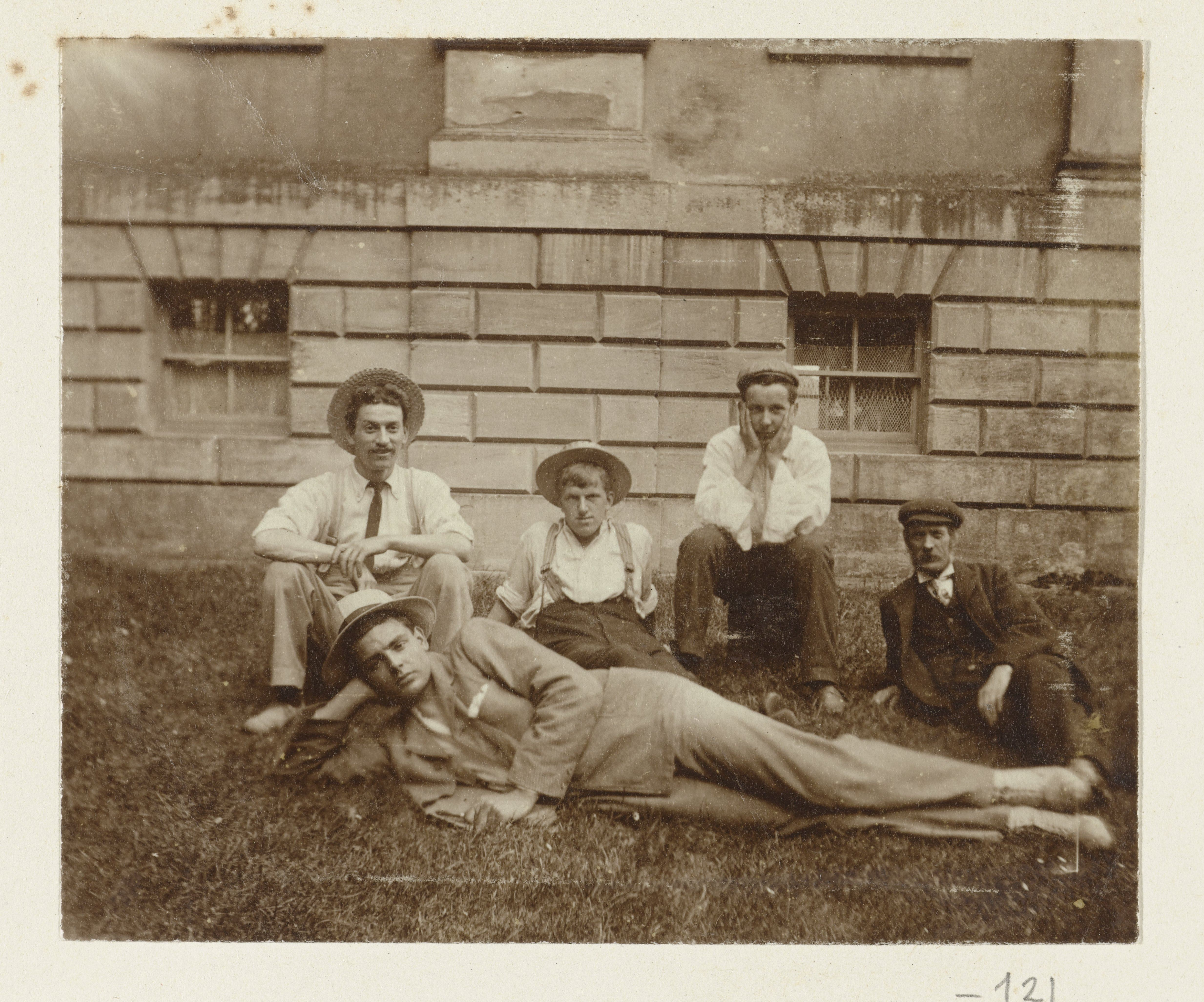 IdentificatieTitel(s): Dolph Kessler met vrienden op het gras voor een huis in GainsboroughObjecttype: foto Objectnummer: RP-F-2007-6-121Omschrijving: Dolph Kessler met vrienden op het gras voor een huis in Gainsborough. Onderdeel van het fotoalbum van Dolph Kessler met opnamen die hij maakte tijdens zijn verblijf in Engeland en op een wereldreis die hij als secretaris van Henri Deterding (directeur Koninklijke Olie) ondernam naar Nederlands-Indië, Japan, China en de Verenigde Staten, tussen 1906 en 1908.VervaardigingVervaardiger: fotograaf: Geldolph Adriaan Kessler (omgeving van)Plaats vervaardiging: GainsboroughDatering: ca. 1903 - ca. 1904Fysieke kenmerken: daglichtgelatinezilverdruk op albumbladMateriaal: karton fotopapier Techniek: daglichtgelatinezilverdrukAfmetingen: foto: h 80 mm × b 110 mmblad: h 363 mm × b 268 mmVerwerving en rechtenCredit line: Schenking van de Stichting Kessler-de LangeVerwerving: schenking 2007Copyright: Publiek domein